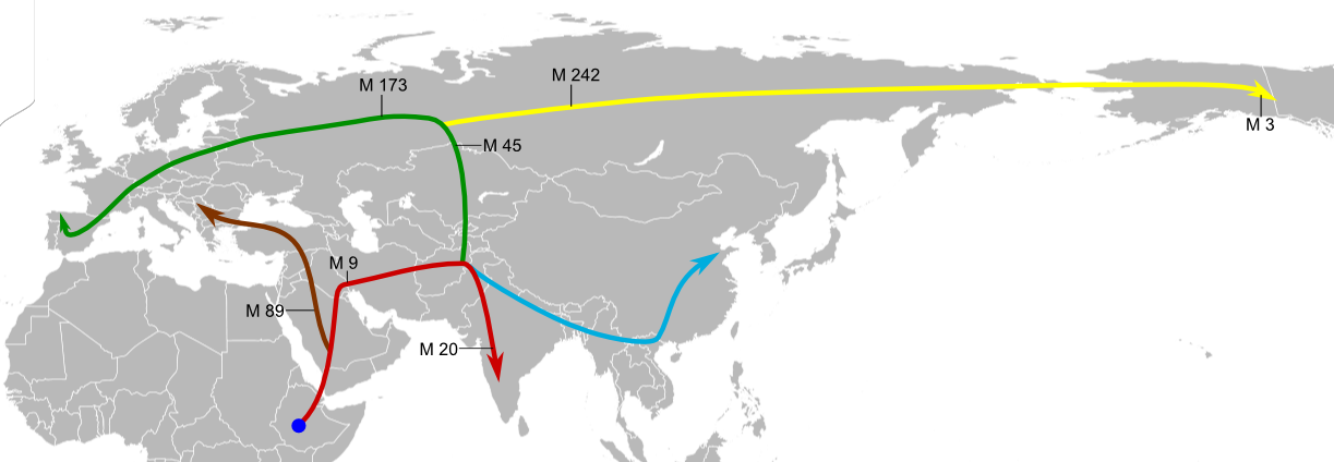 Karte über die Ausbreitung des Menschen von Afrika über Asien nach Nordamerika.